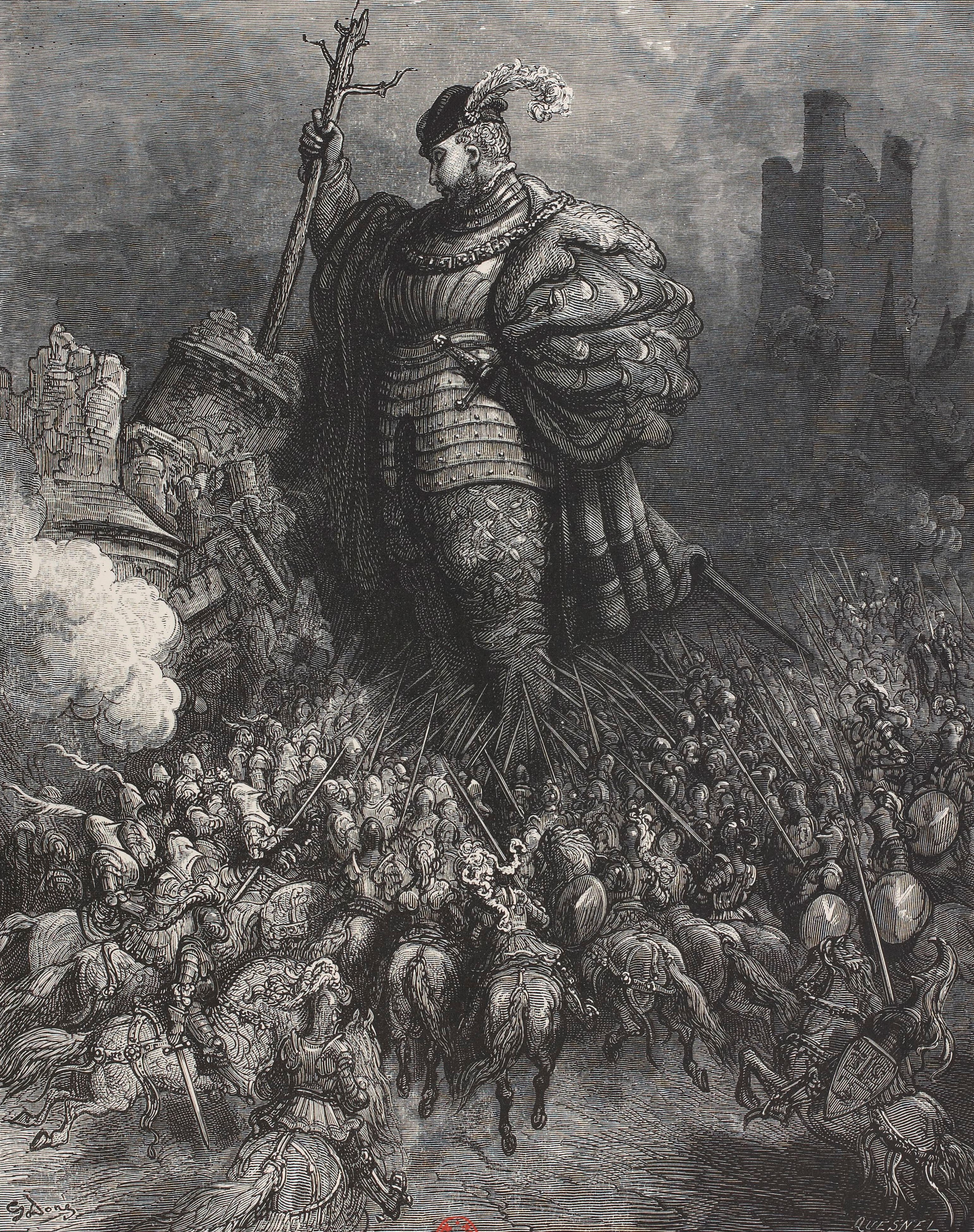 Le géant Gargantua détruit de le château du gué de Vède avec un arbre dans le cadre de la guerre pricrocholine. Gravure de Gustave Doré du premier tome de l'édition des Œuvres de Rabelais en 1873 par l'éditeur Garnier Frères.